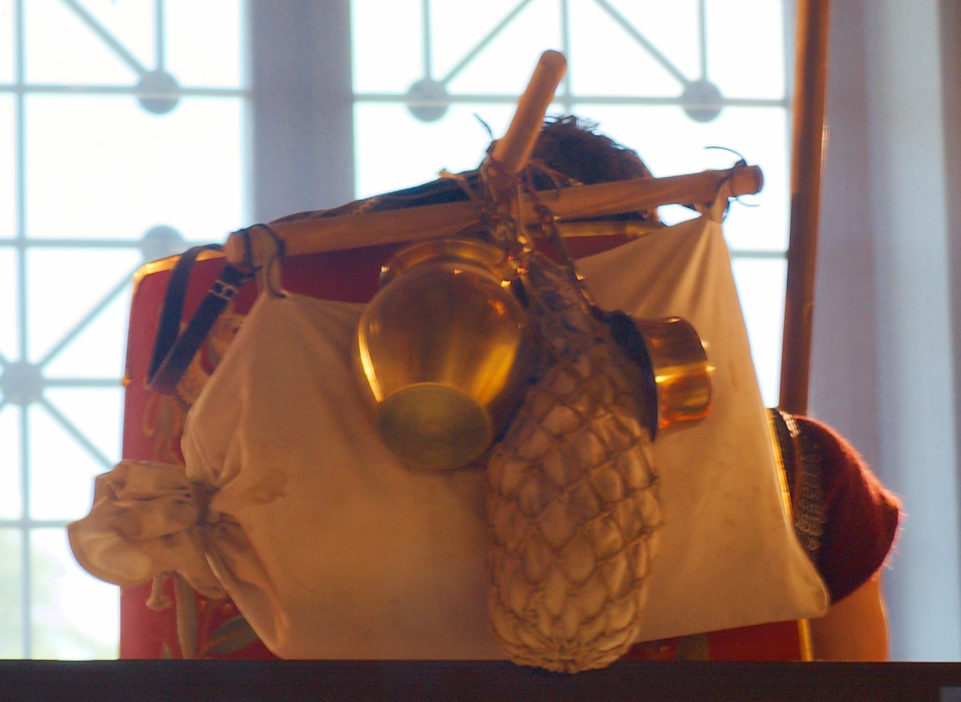 Rekonstruktion des Marschgepäcks eines römischen Legionärs. Museum Carnuntum